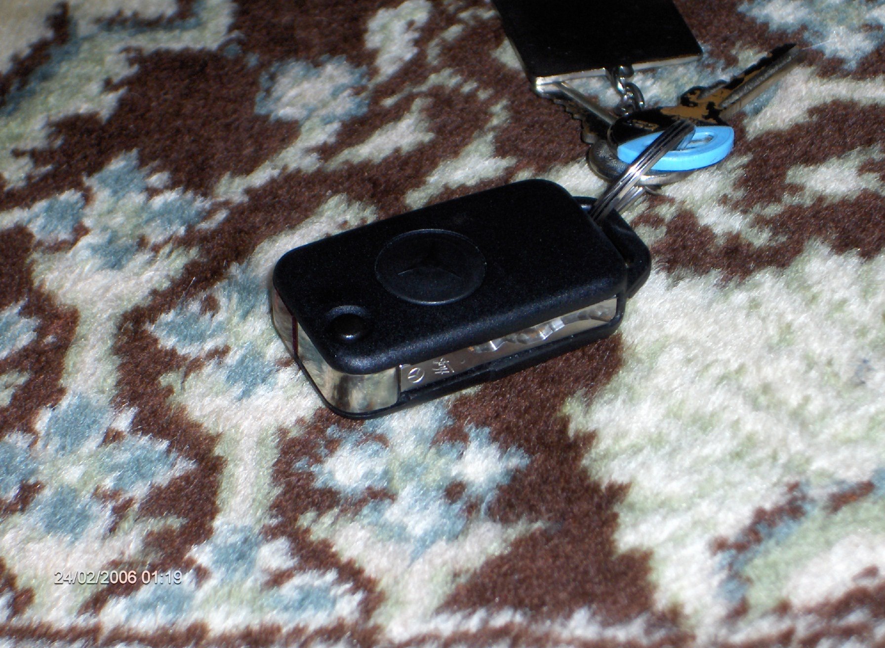 een foto van een gesloten klapsleutel, zelf gemaakt.